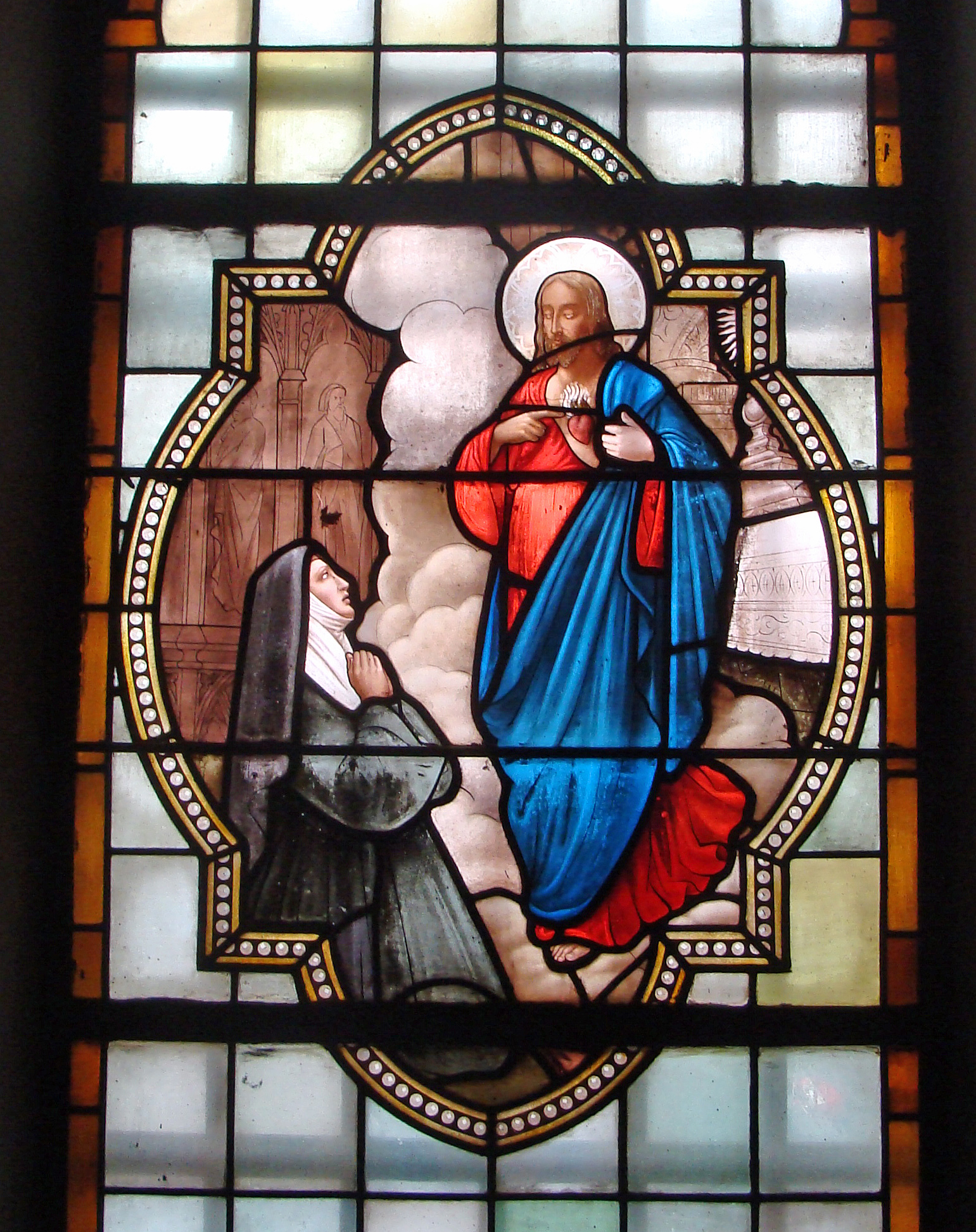 église Saint-Nicolas, L'Hôpital, vitrail sacristie